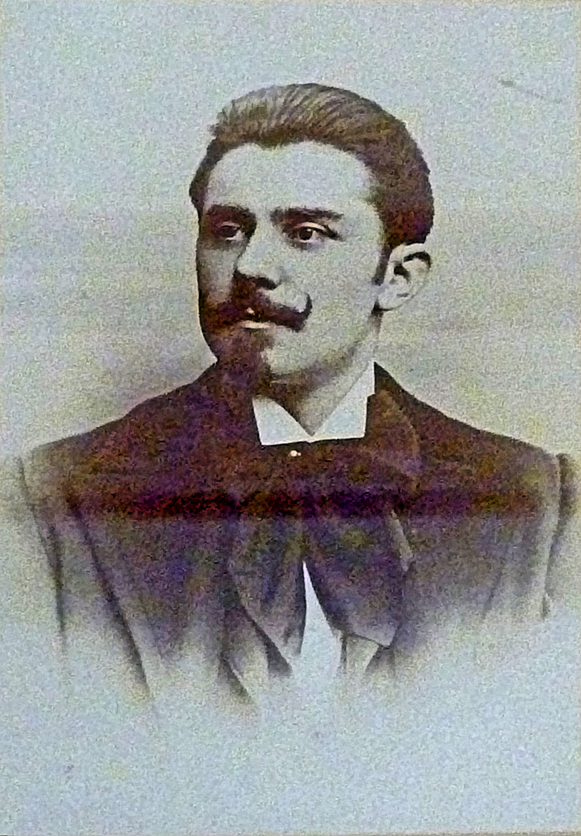 Emile Bulcke (21 jaar oud) in 1896